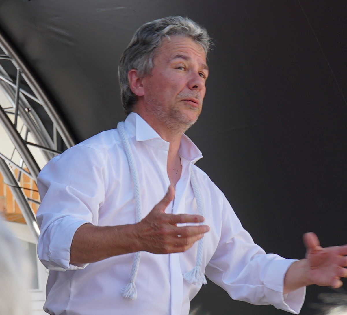 Jean-Paul Fouchécourt lors des Flâneries musicales 2015.